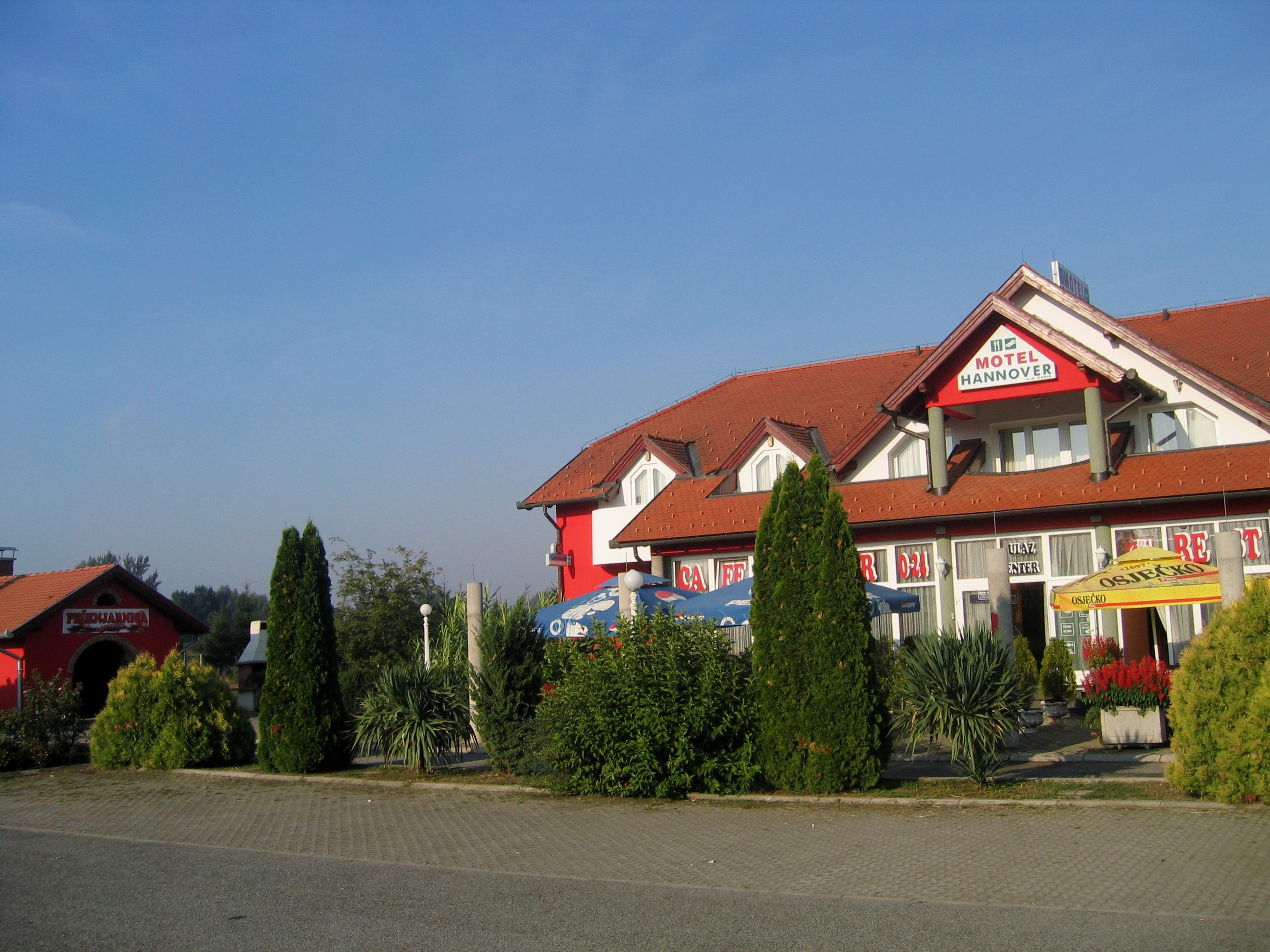 Croatie Kruševica Motel Hannover